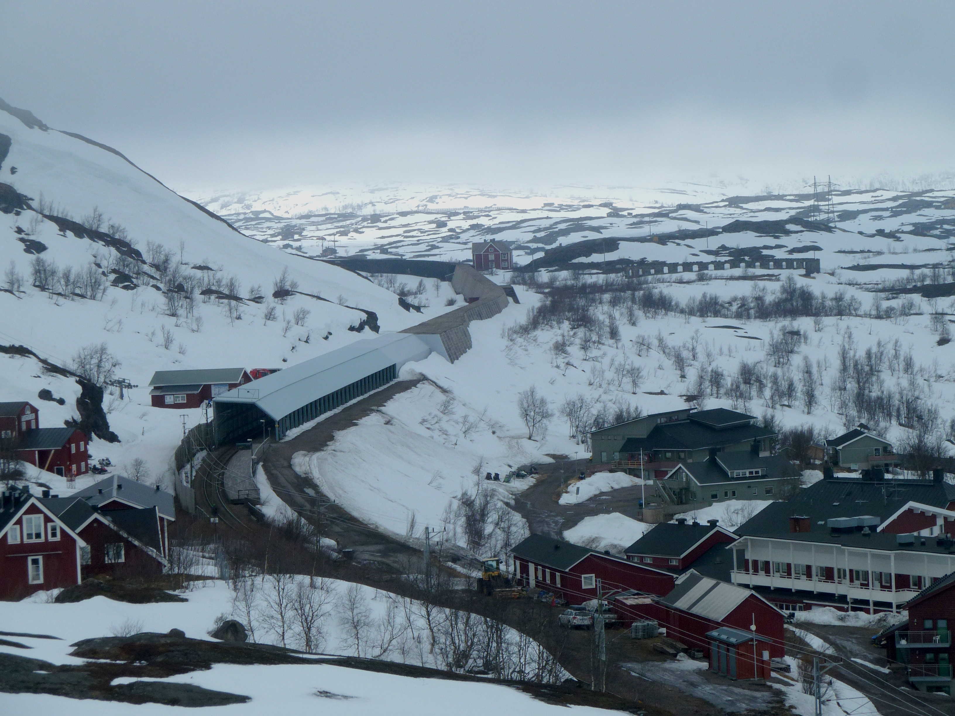 Blick auf die Malmbana in "Riksgränsen"